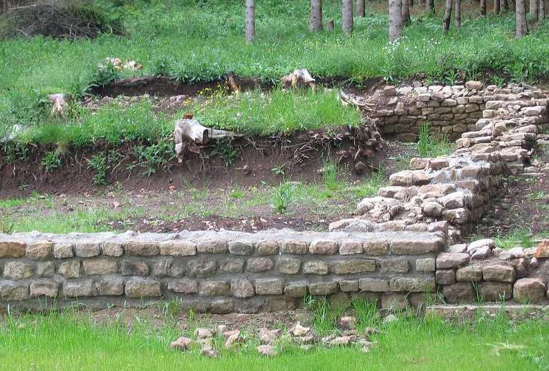 Römisches Freilichtmuseum Hechingen, Ausgrabung Haus des Schmiedes